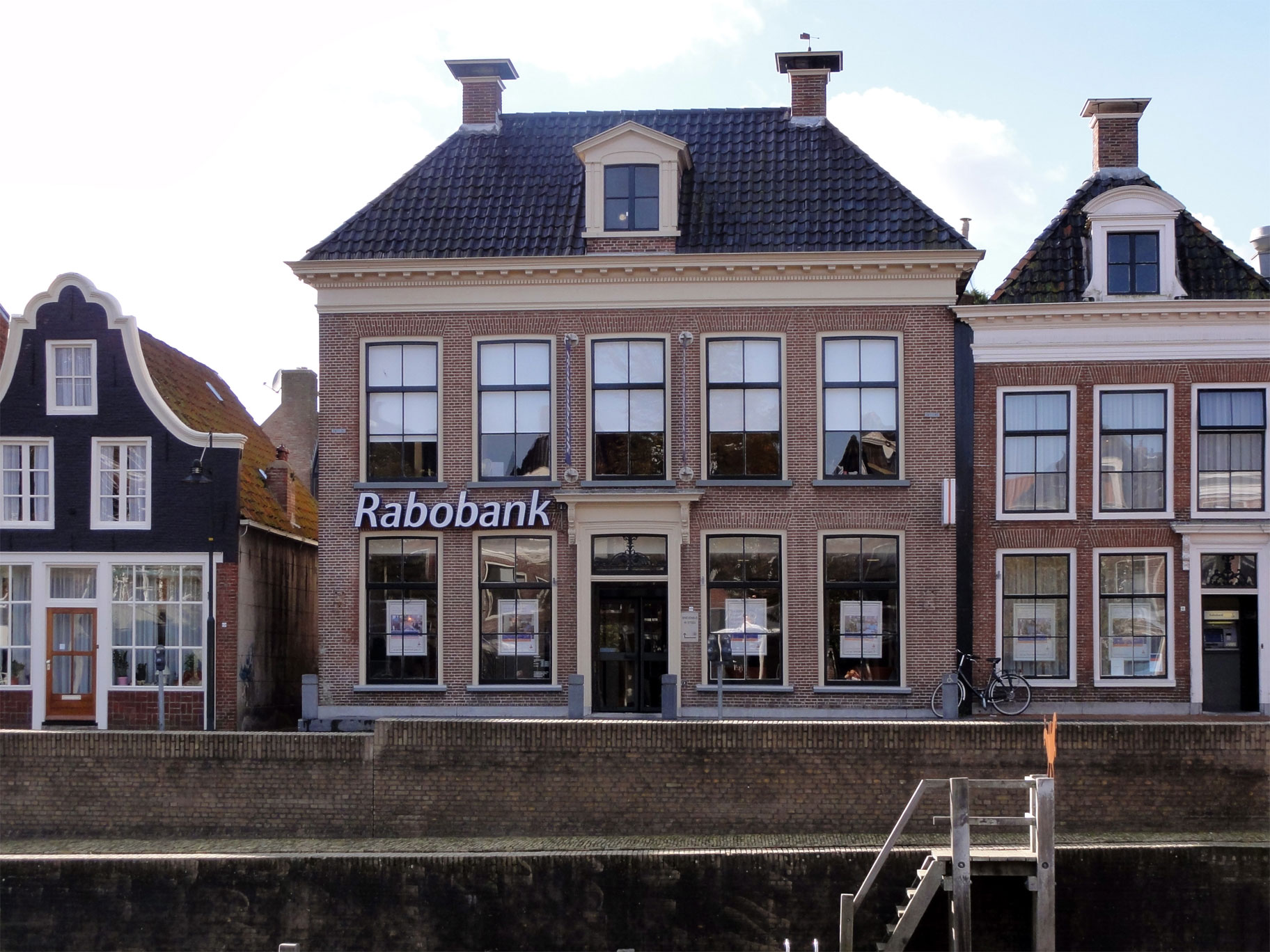 De Dijk 10 Dokkum. rijksmonument